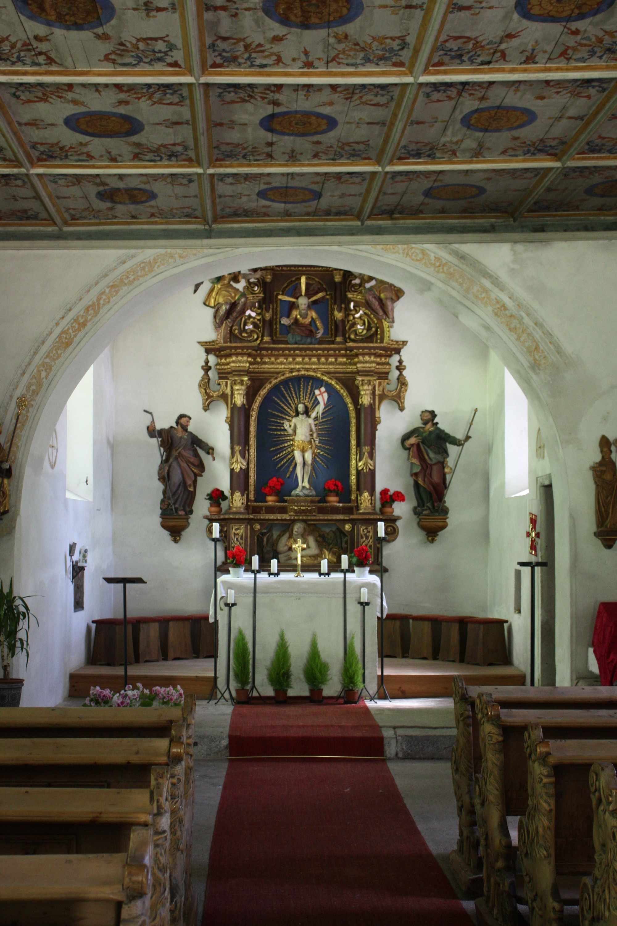 Brixen, Südtirol: Innenansicht der Kirche St. Cyrill nahe Tils